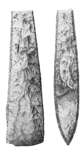 Tjocknackig flintyxa. Närke